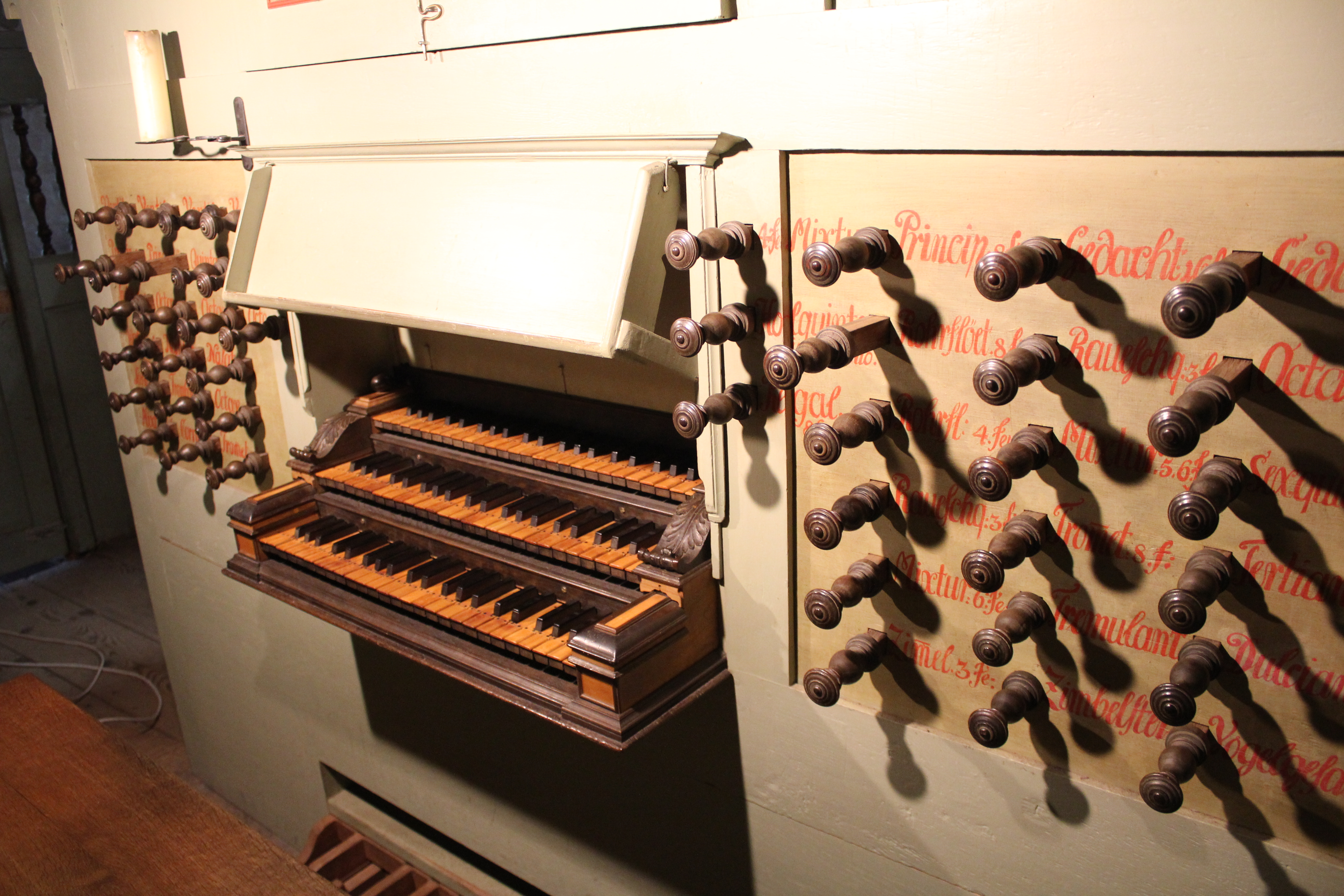 Orgel der St.-Jacobi-Kkirche Lüdingworth, Cuxhaven, Niedersachsen, Deutschland